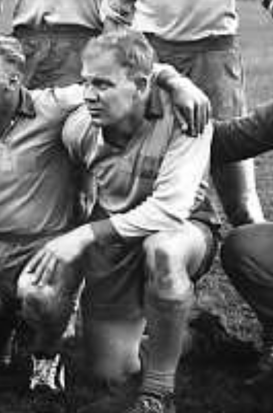 Sigge Parling en 1958